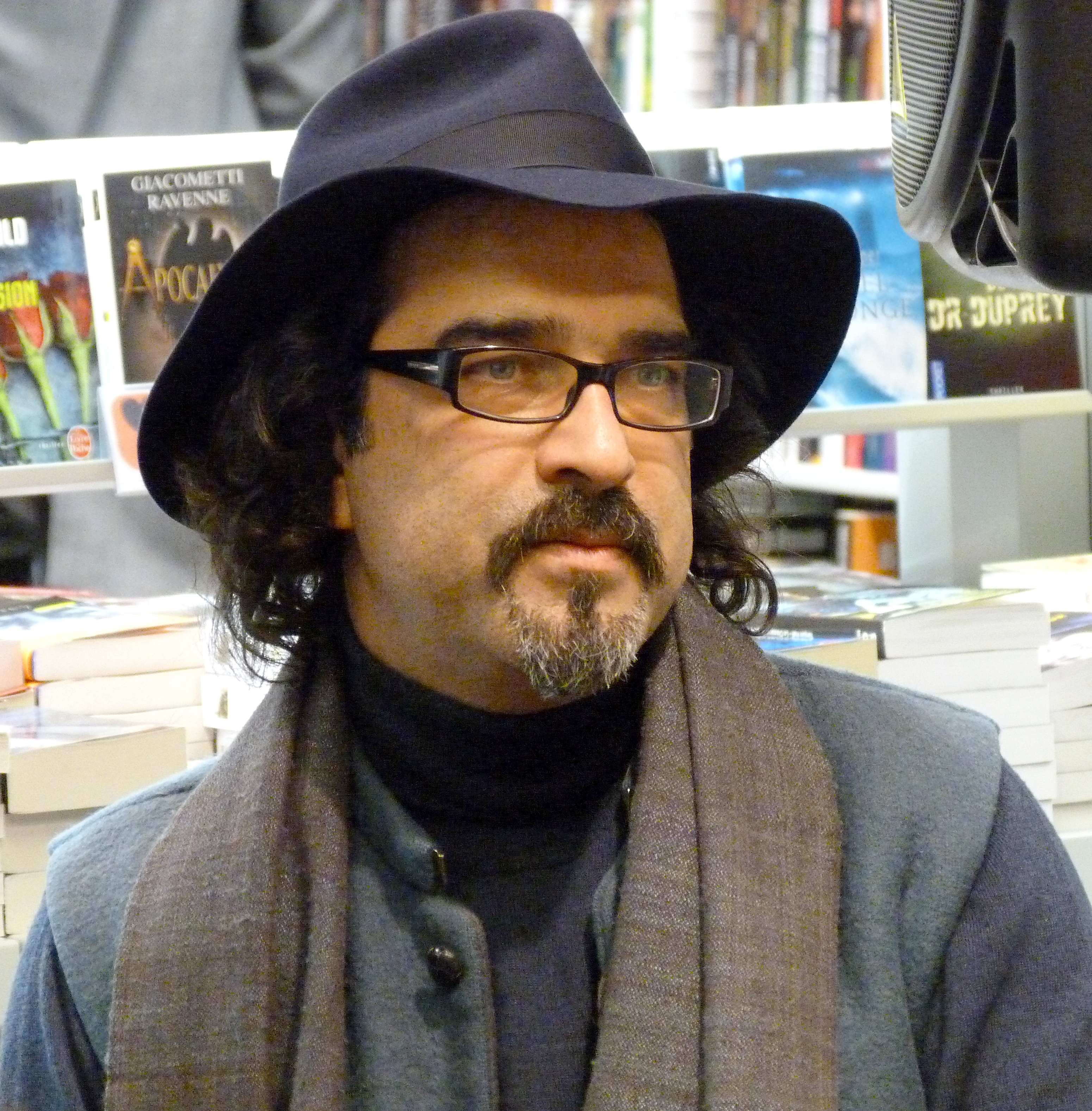 Atiq Rahimi, écrivain afgano-français et prix Goncourt 2008, le 10 décembre 2010 à la FNAC Odéon, en compagnie du photographe Reza Deghati, pour le livre de photos de Reza Derrière l'objectif de Reza.